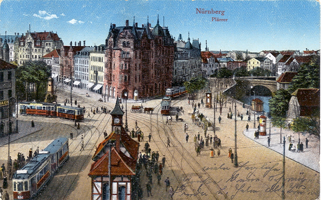 Postkarte, datiert 28.4.1917. Beschriftung: "Nürnberg - Plärrer".